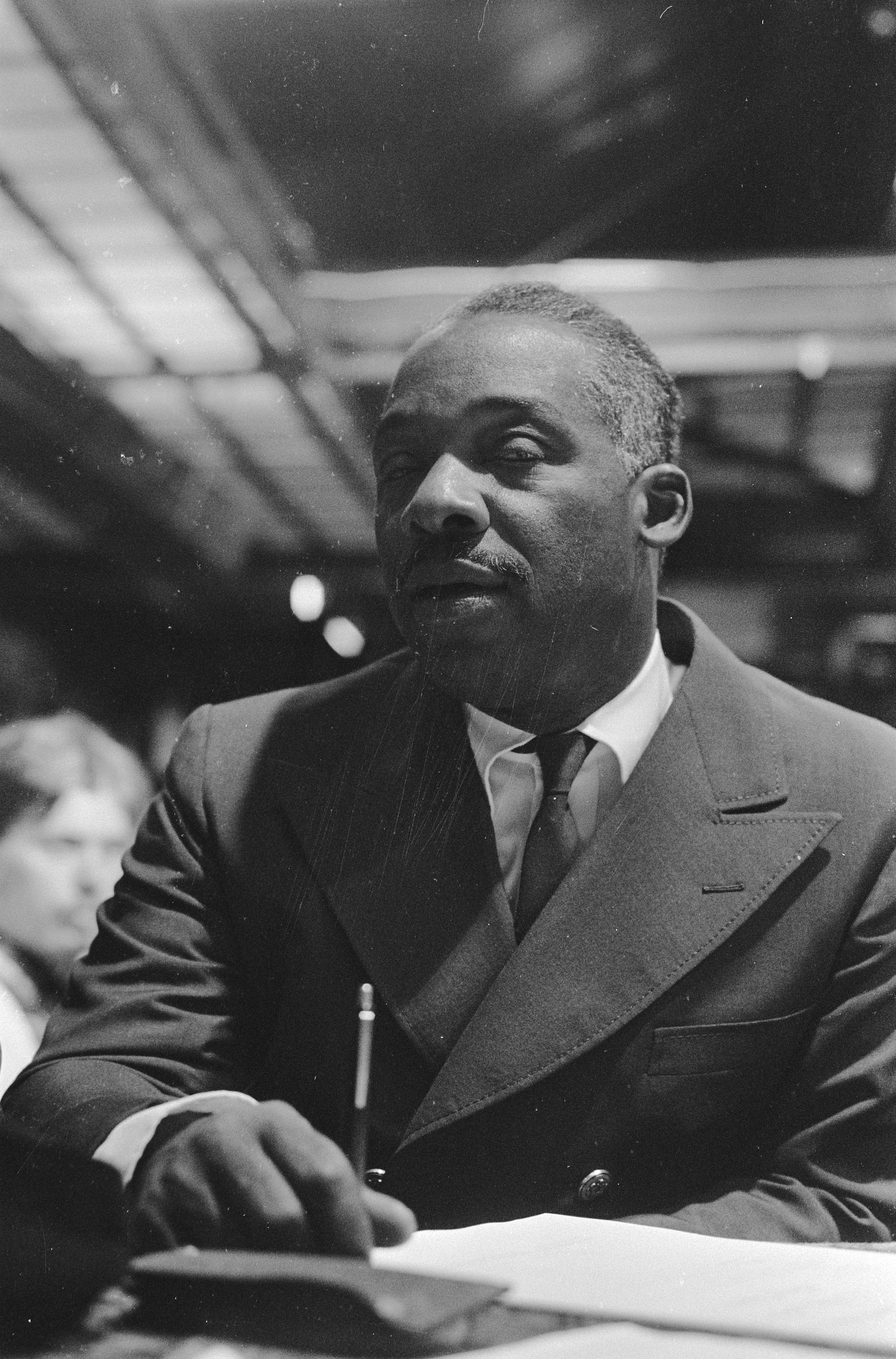 Collectie / Archief : Fotocollectie Anefo Reportage / Serie : [ onbekend ] Beschrijving : Finale Internationaal Jazz Festival Loosdrecht, drummer Kenny Clarke. Datum : 7 augustus 1971 Locatie : Loosdrecht Trefwoorden : festivals Persoonsnaam : Internationaal Jazz Festival, Kenny Clarke Fotograaf : Punt, […] / Anefo Auteursrechthebbende : Nationaal Archief Materiaalsoort : Negatief (zwart/wit) Nummer archiefinventaris : bekijk toegang 2.24.01.05 Bestanddeelnummer : 924-7968